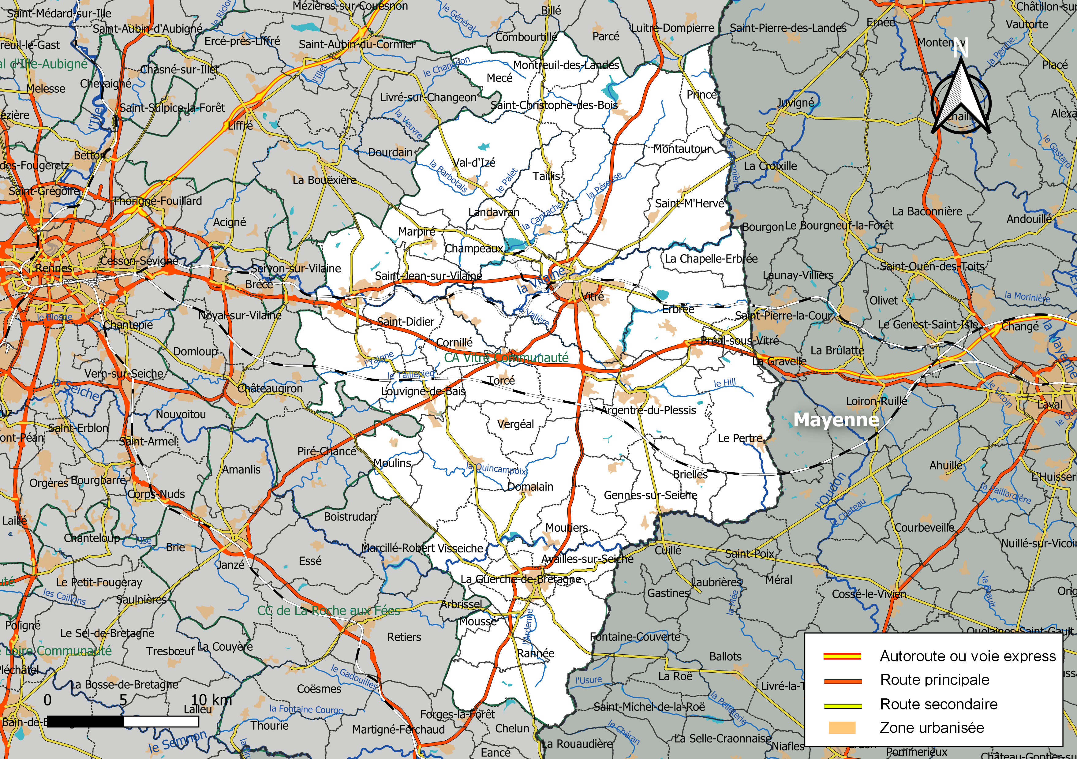 Carte géographique de l'intercommunalité Vitré Communauté, département d'Ille-et-Vilaine, France. Composition au 1er janvier 2019.